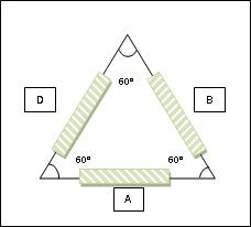 Configuración de la roseta en triangulo equlilátero.